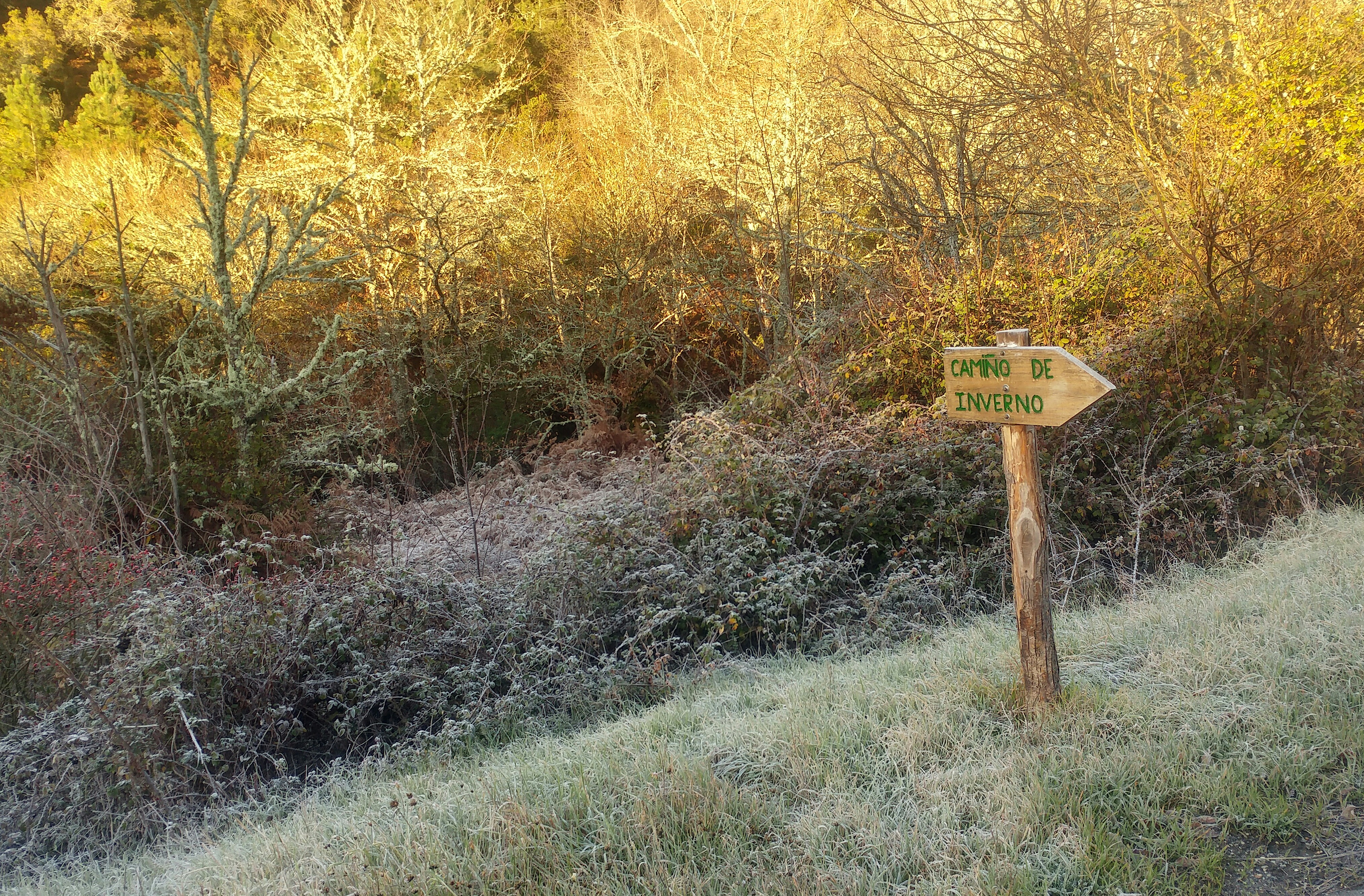 Un des marqueurs du Camino de Invierno près de Quiroga